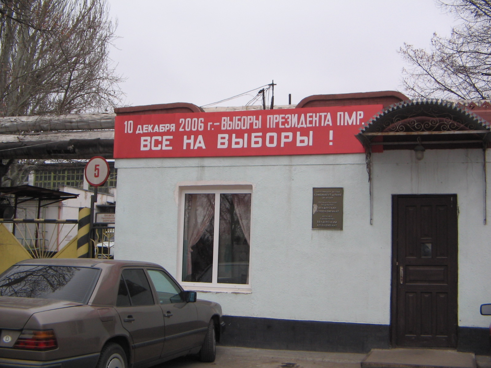 Плакат на бендерском хлебокомбинате с призывом голосовать на выборах